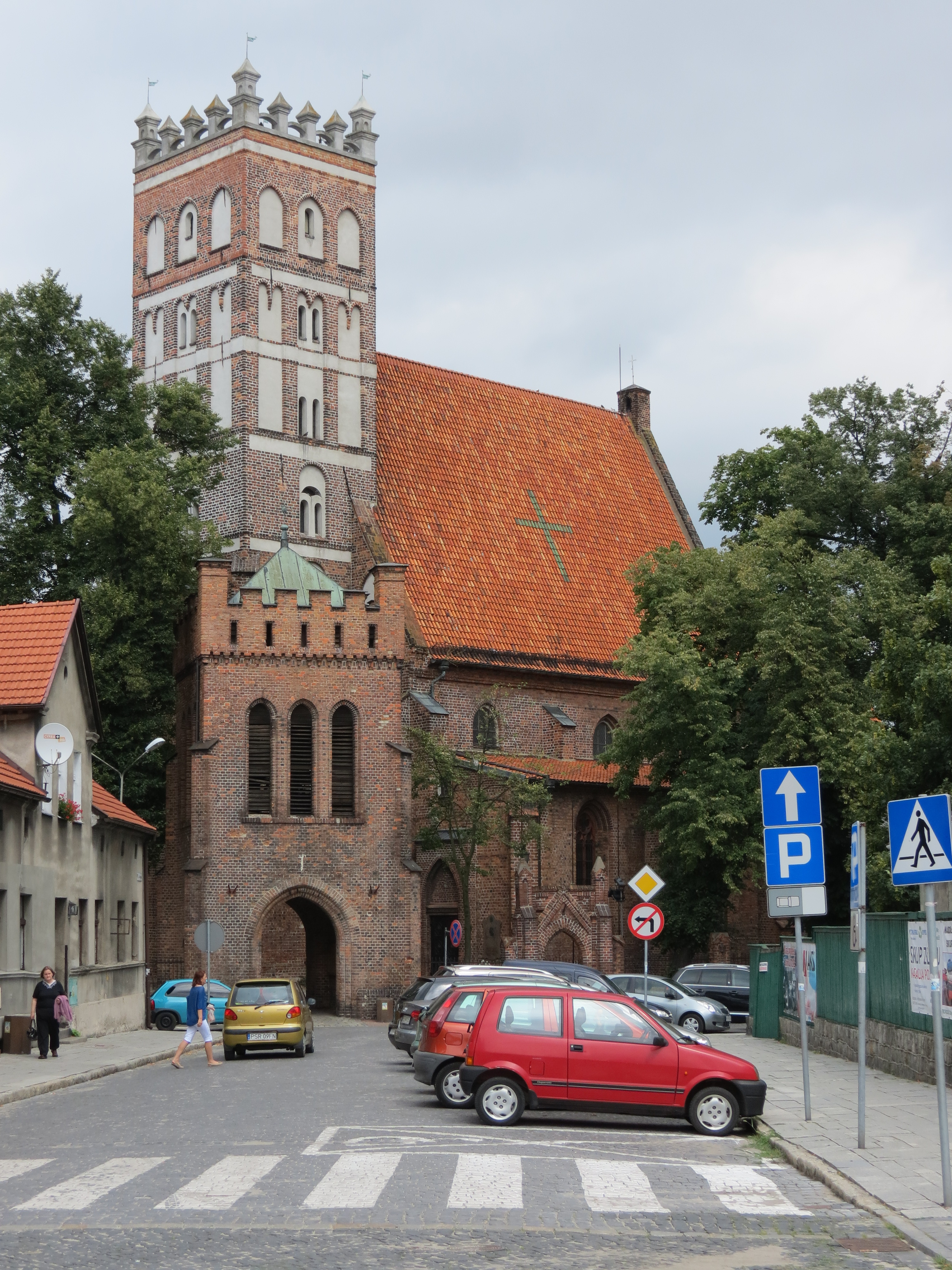 Środa Wielkopolska, kościół par. p.w. Wniebowzięcia NMP, 1423-1428, XV/XVI, XIX